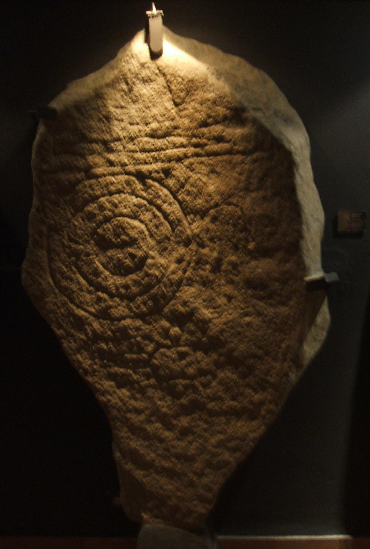 En Zarza de Montánchez se halló una estela decorada